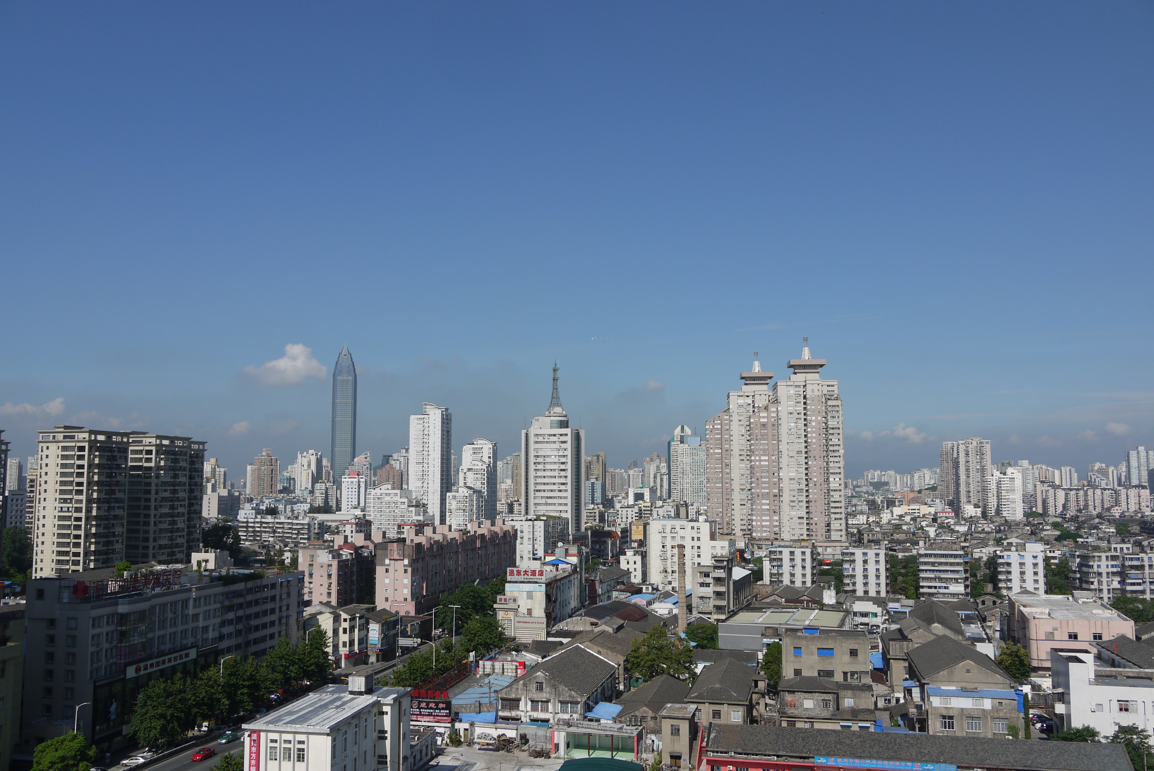 Vue générale de Wenzhou. Au fond,le Wenzhou World Trade Center